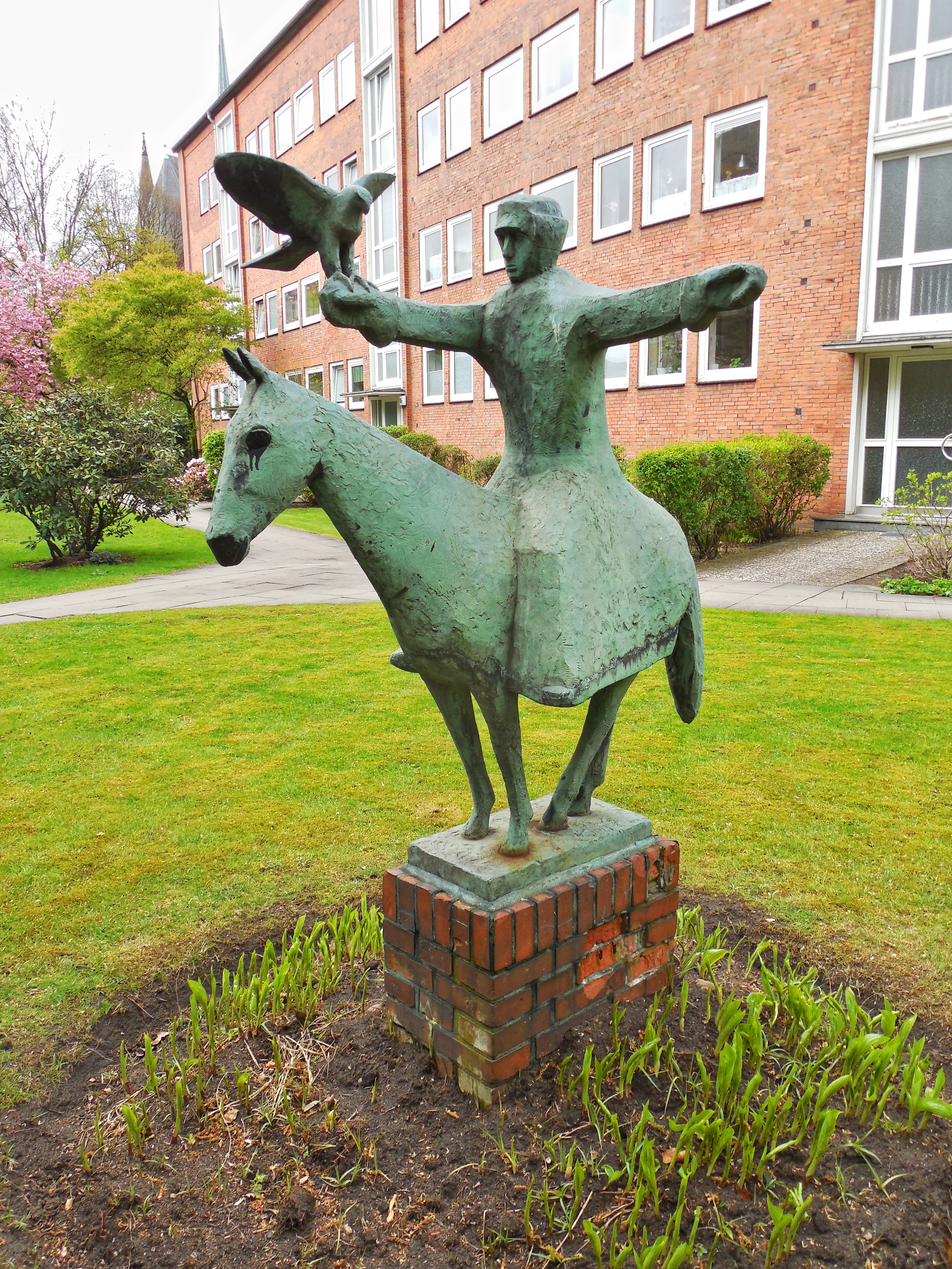 Uhlenhorst, Hamburg, Germany